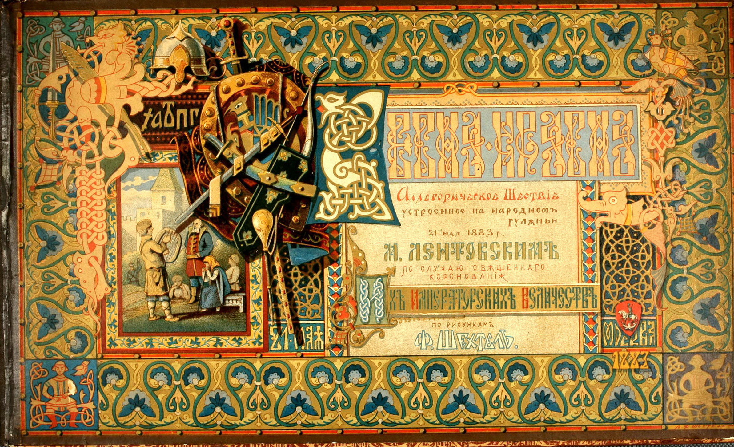 Альбом "Весна красна". Год издания: 1883 Автор: М.В. Лентовский (постановка), Л.И. Гуляев (стихи), Ф. О. Шехтель (художник-постановщик, автор иллюстраций) Издатель: М.В. Лентовский Хромо-литография: Ф.И. Нейбюргер Город: Москва